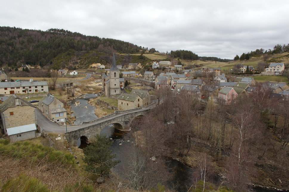 Saint-Juéry